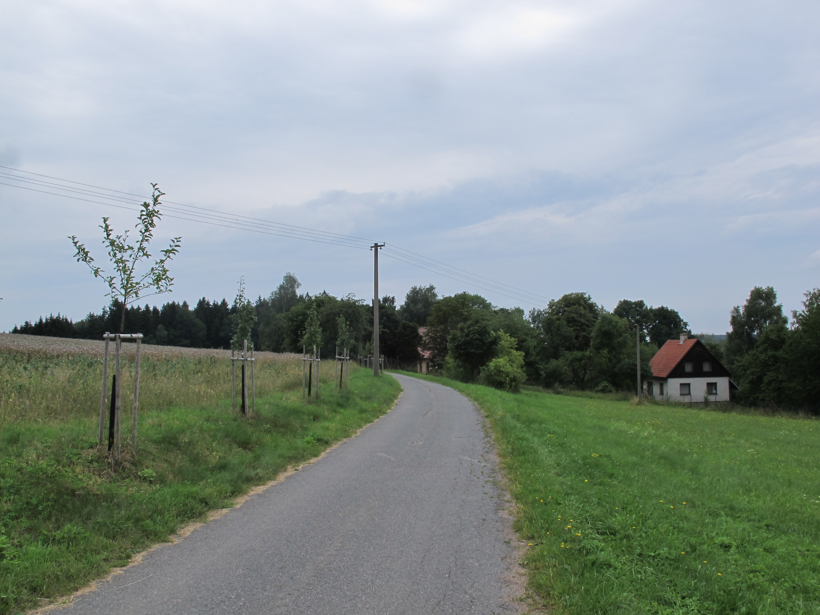 Vratkov, okres. Havlíčkův Brod - cesta k Vratkovu.